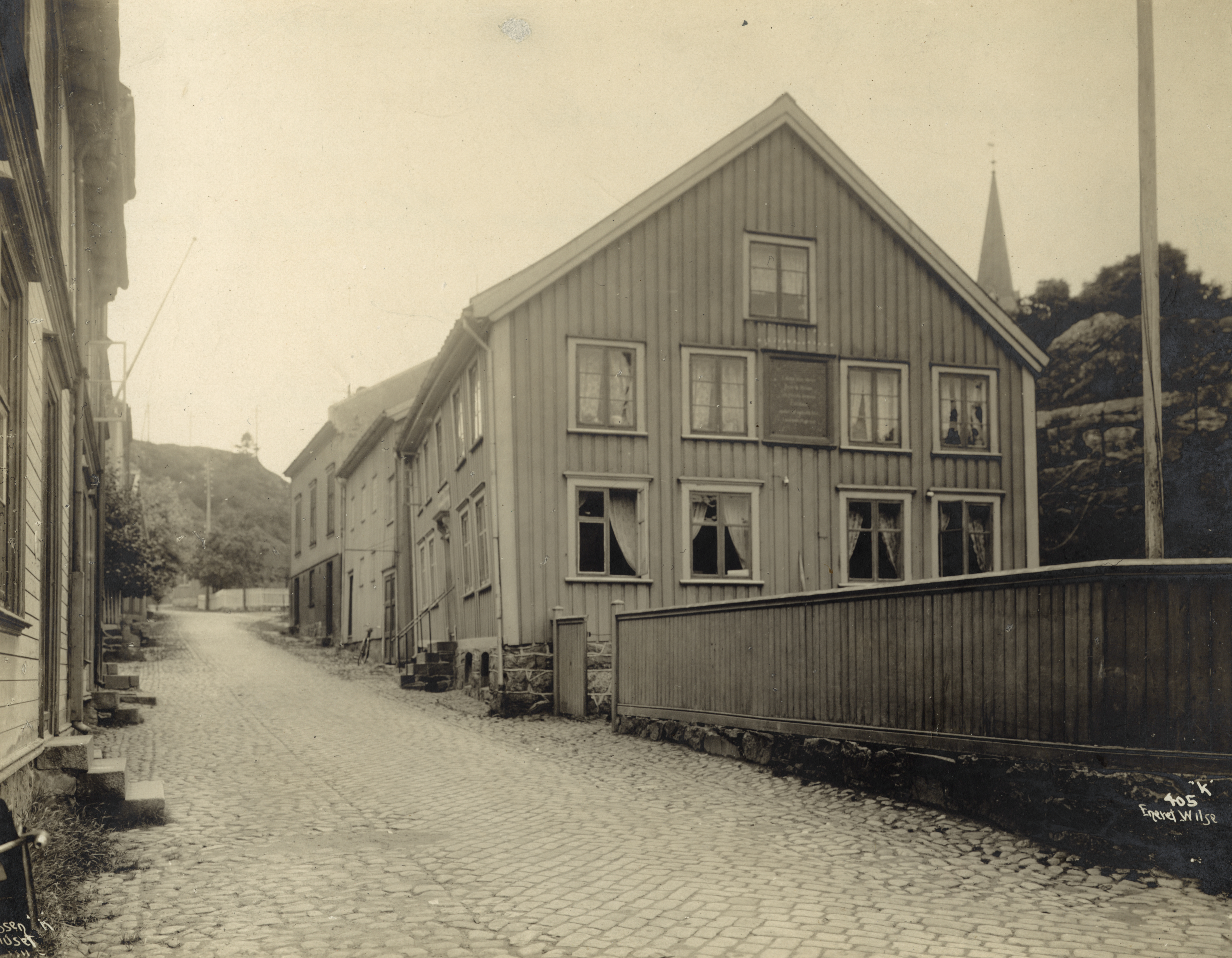 Ibsenhuset (gamle apotek) i Grimstad, Aust-Agder This image on crowdsourcing geotagging platform Fotodugnad